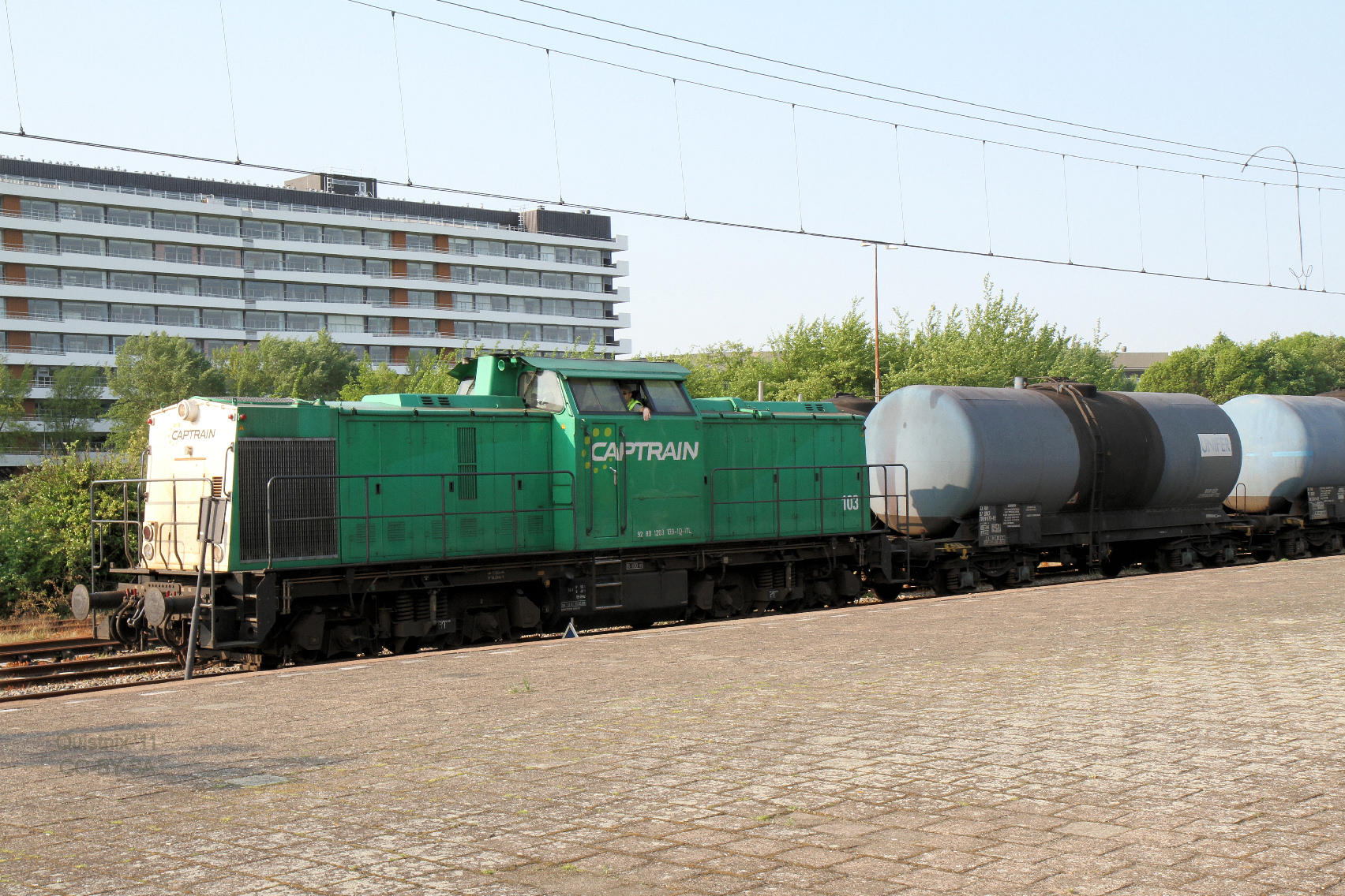 Captrain loc, wachtend bij station Vlaardingen Centrum